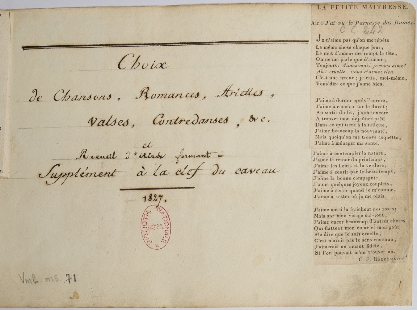 Page de titre d'un recueil d'airs manuscrits avec des chansons imprimées.